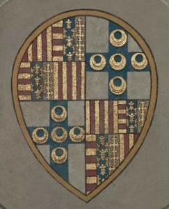 Wall Mural coat of arms Piccolomini d'Aragona